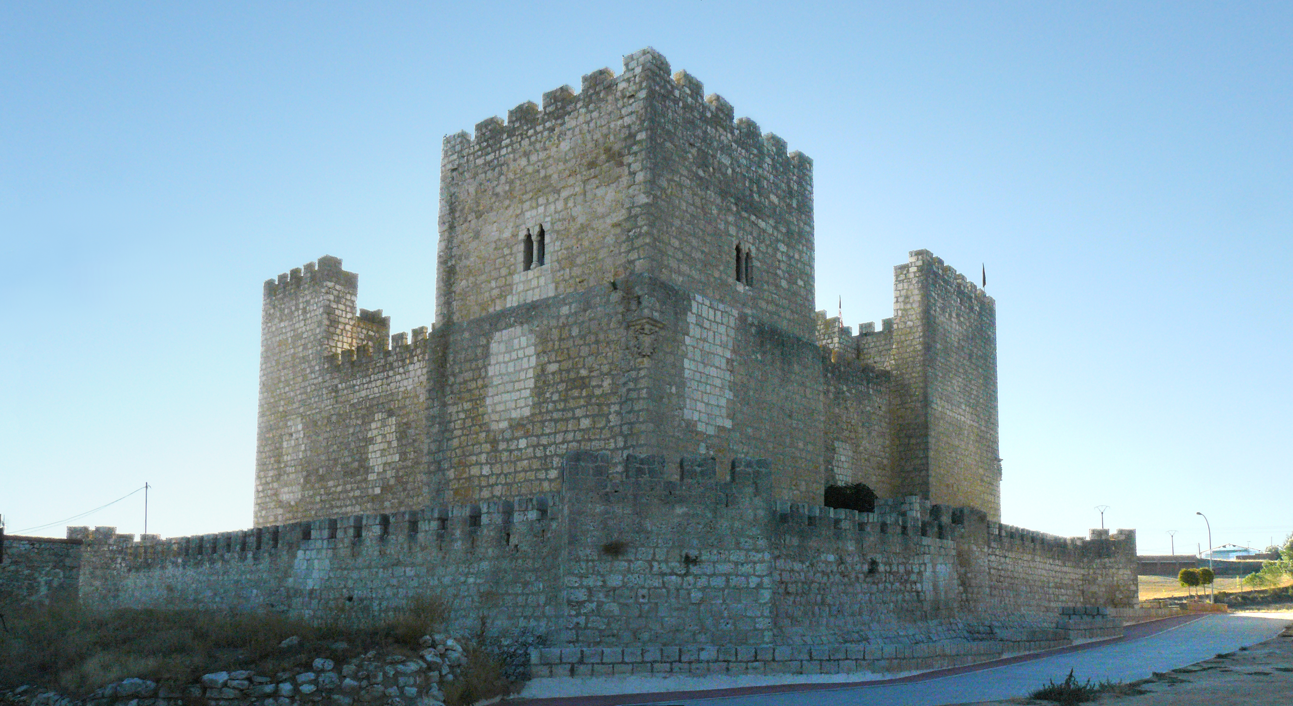 Encinas de Esgueva, Valladolid.